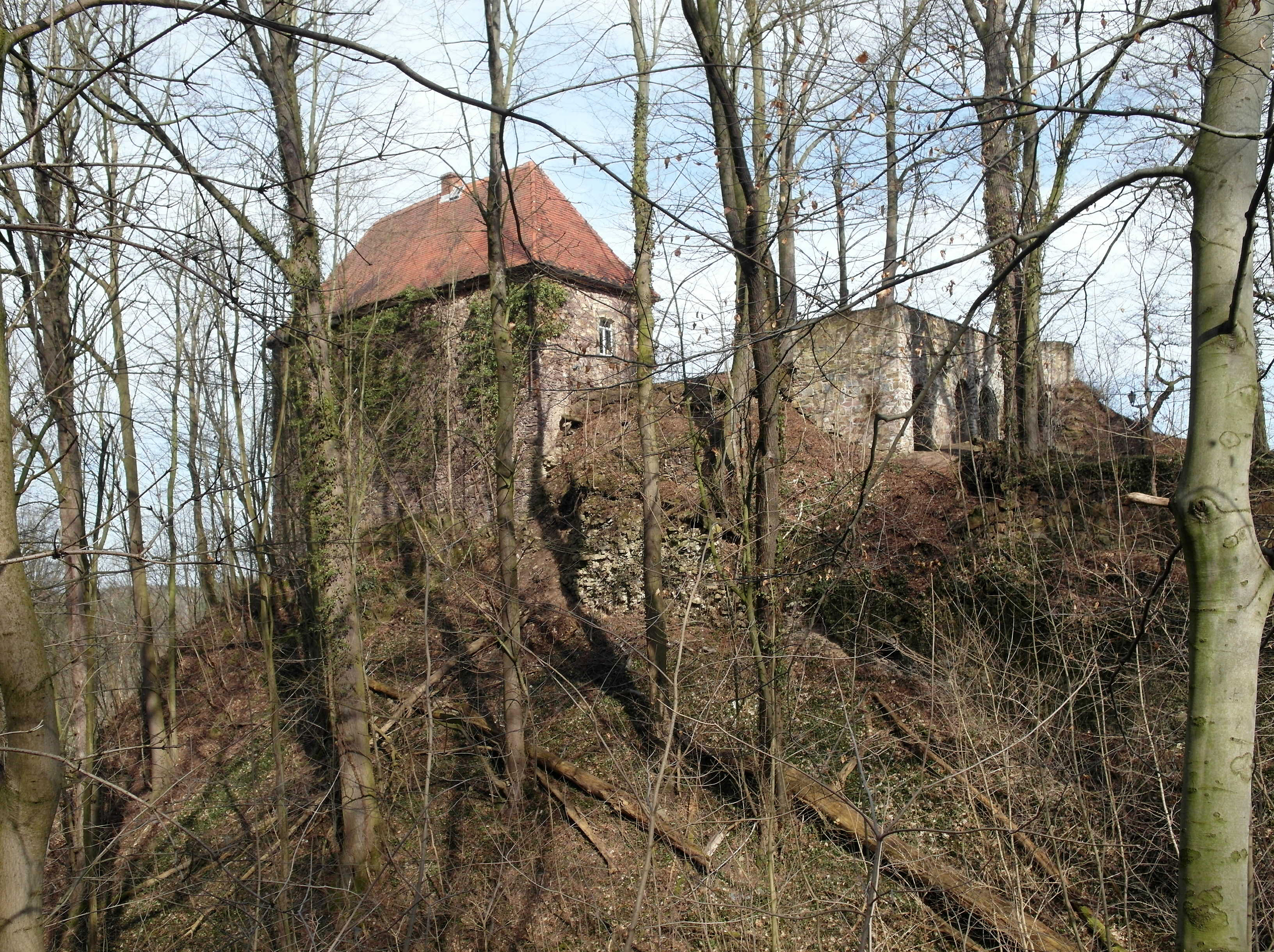 17.03.2015 09629 Bieberstein (Reinsberg): Auf den Resten einer Burg aus dem 14. Jh. wurde 1721 das Eremitorium errichtet. [SAN8960.JPG]20150317635DR.JPG(c)Blobelt.